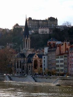 Vue des berges de la Saône à Lyon